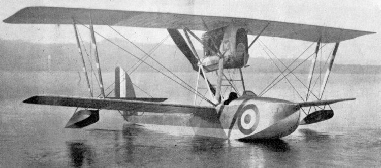 foto d'epoca con più di 70 anni Categoria:Immagini di aeroplani della Macchi